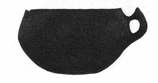 Ceramica di cultura Bonnanaro, necropoli di Cuguttu